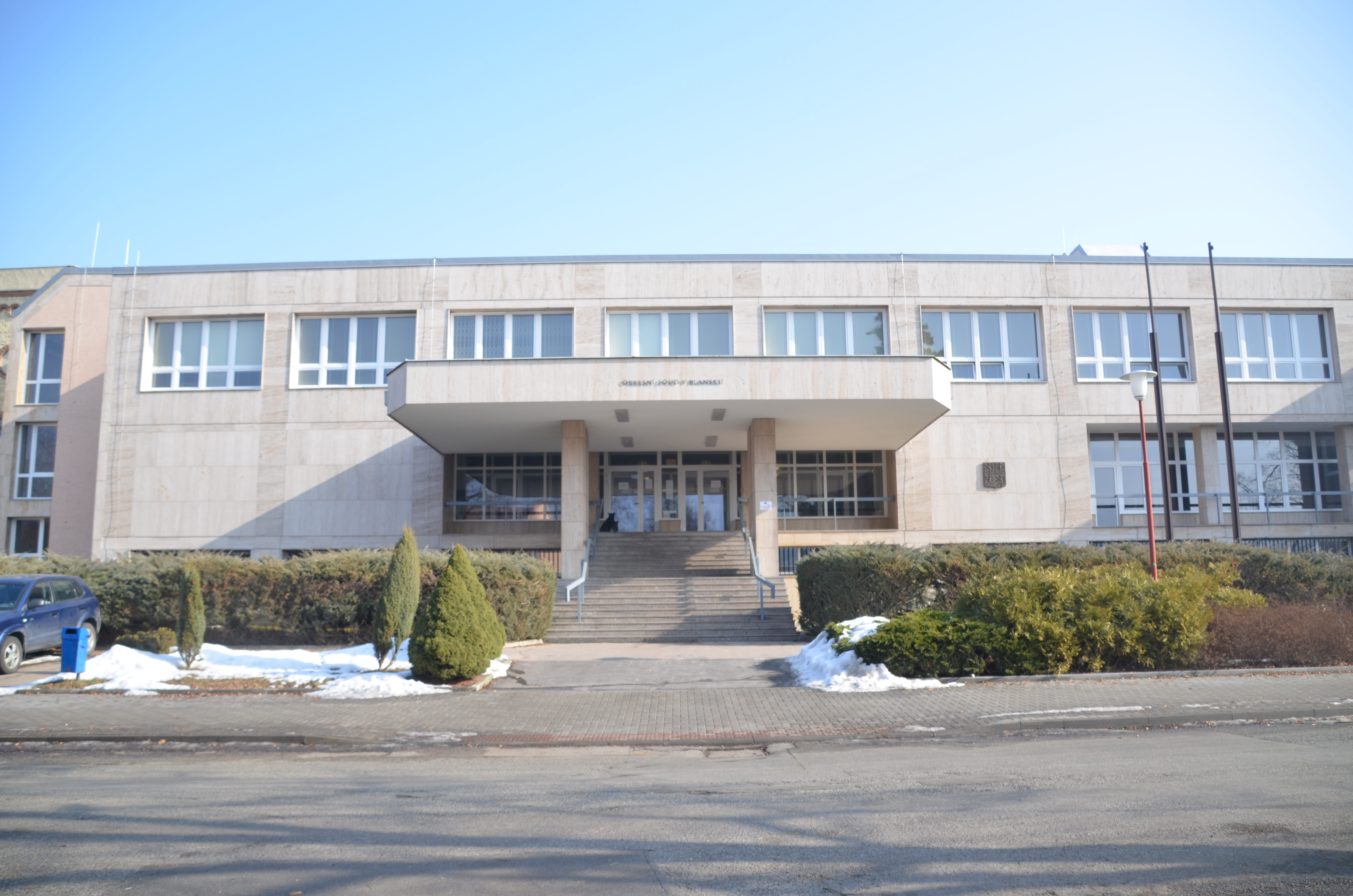 Budova Okresního soudu na ulici Hybešova v Blansku